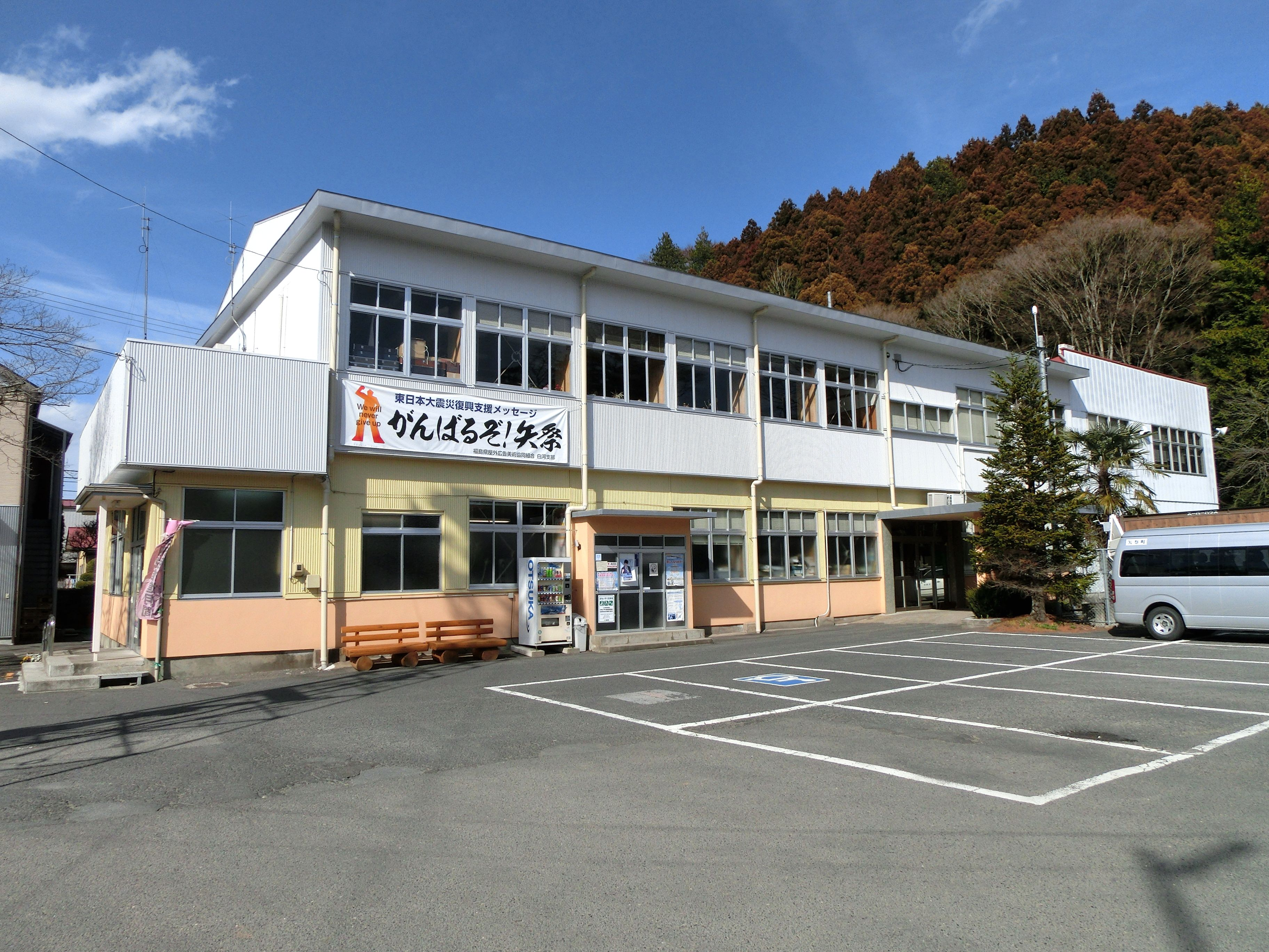 矢祭町役場